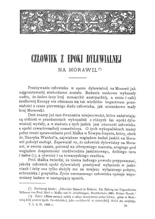 Fragment artykułu "Człowiek z epoki dyluwialnej na Morawii" Józefa Nowalskiego opublikowany w Ateneum Polskim w 1888r.